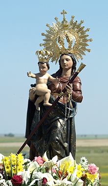 Patrona de Ibahernando